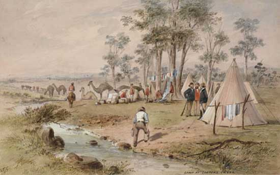 Camp at Coopers Creek, c.1862, by S.T. Gill (1818-1880), Watercolour